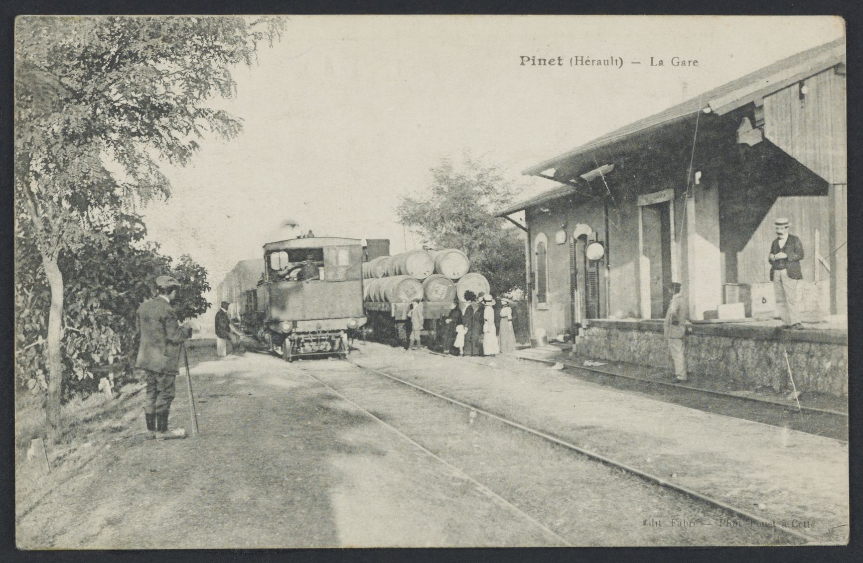 Pinet. - La gare : carte postale (1ère moitié du XXe siècle)